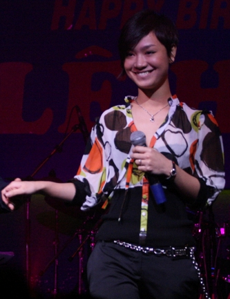 Hình ảnh ca sĩ Trà My